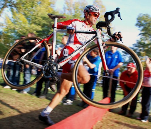 Isaac Suarez saltando uno de los tablones de la carrera de ciclocross de Medina de Pomar (España)